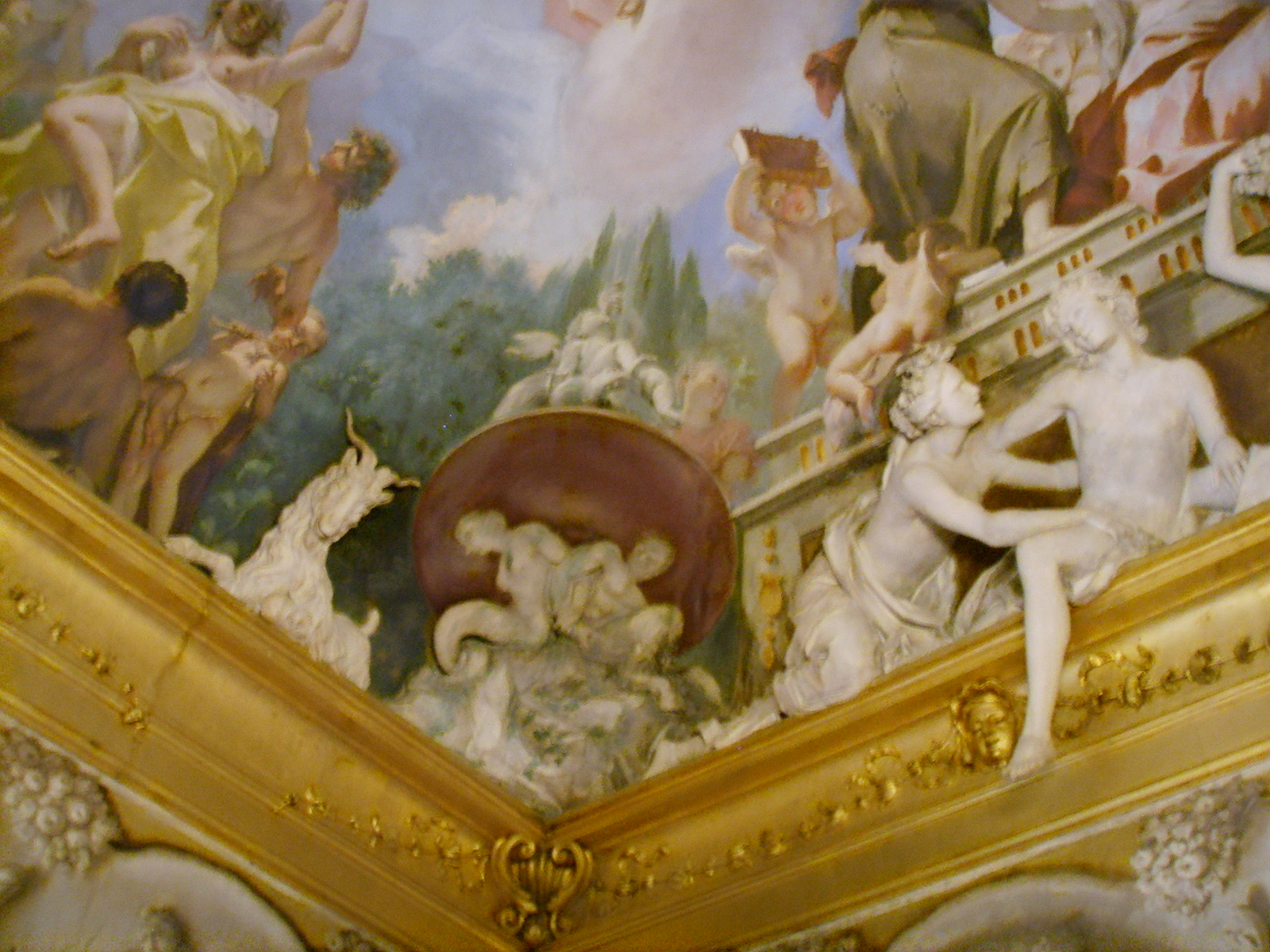 Palazzo fenzi, sala 4, soffitto affrescato e stucchi